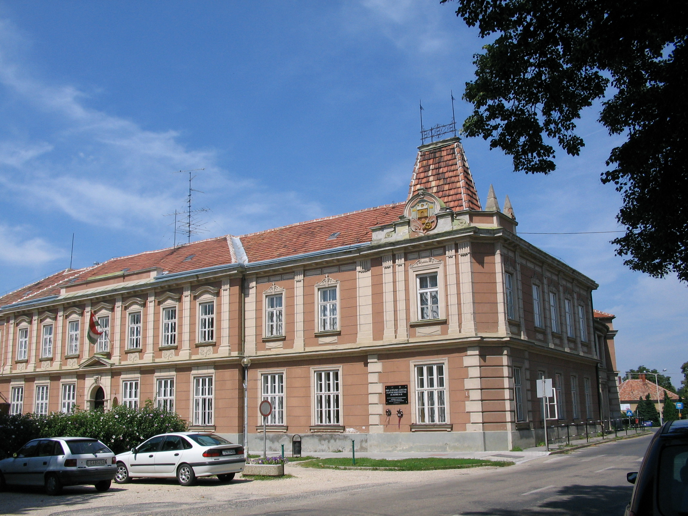 Páli Szent Vince Katolikus Általános Iskola. Volt fiúiskola - Kapuvár, Fő tér 27